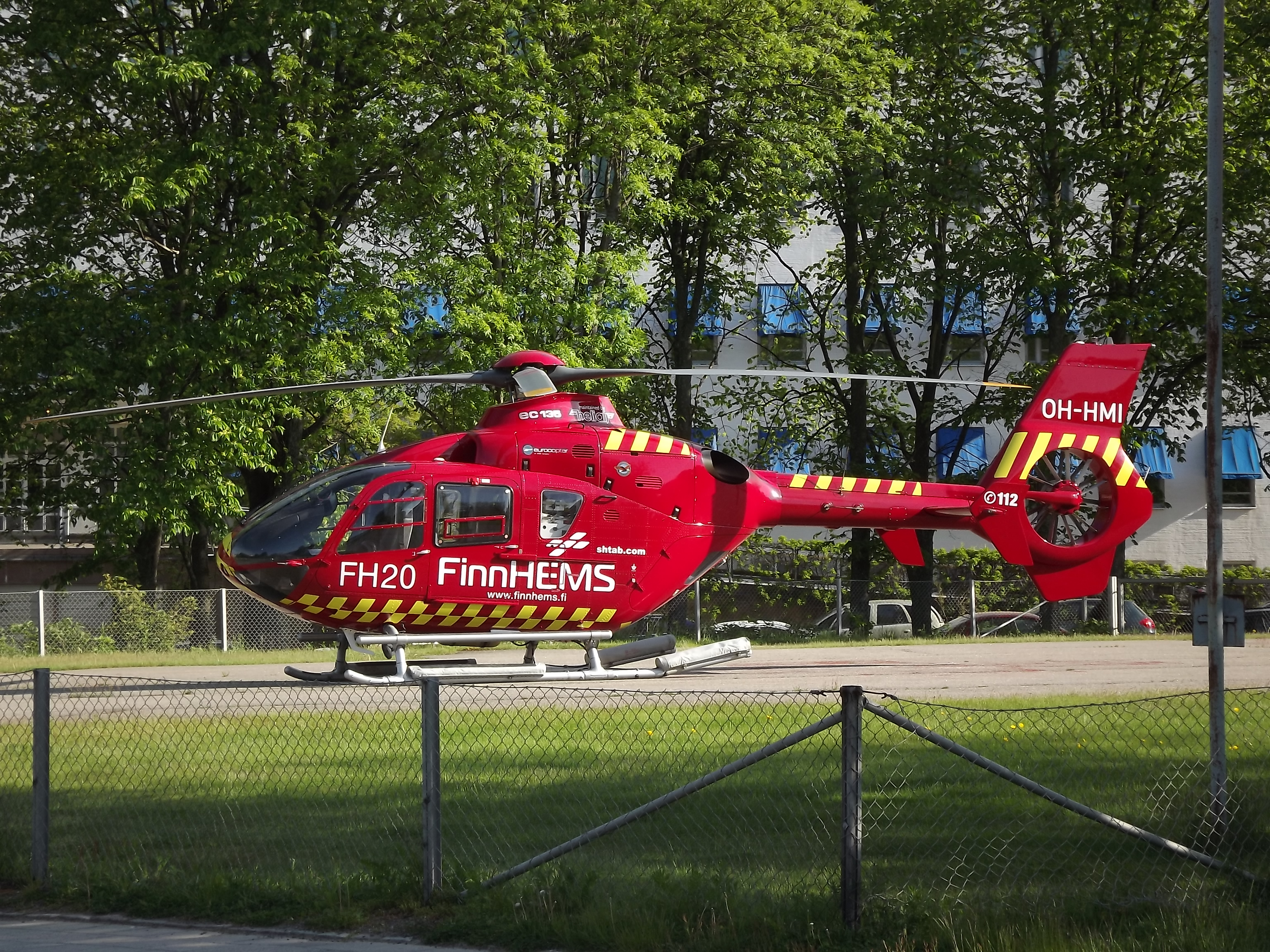 Finnhems läkarhelikopter OH-HMI (FH20) vid Åbo universitetscentralsjukhus.